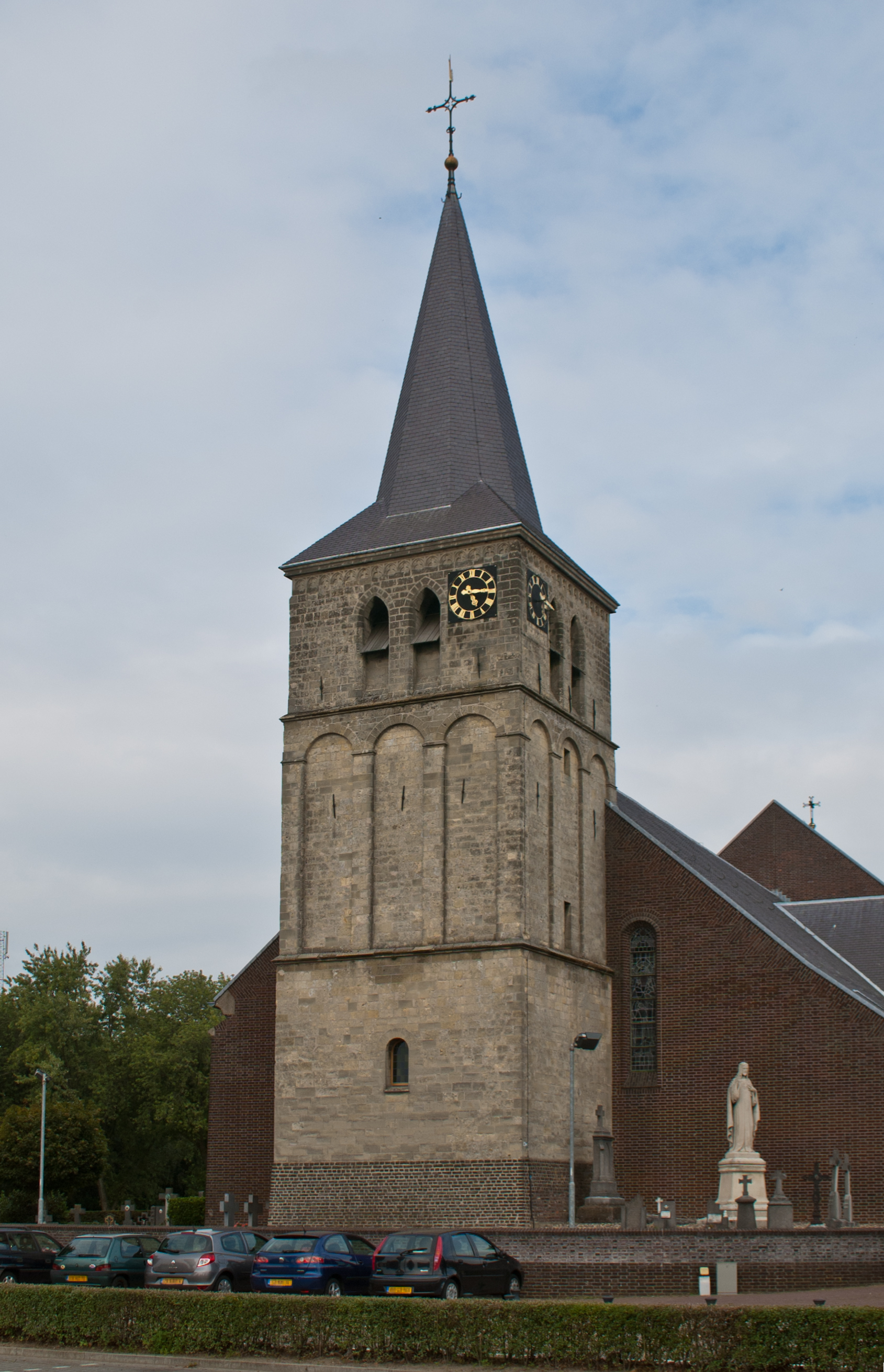 Sint Getrudiskerktoren, Maasbracht, 14. Euw